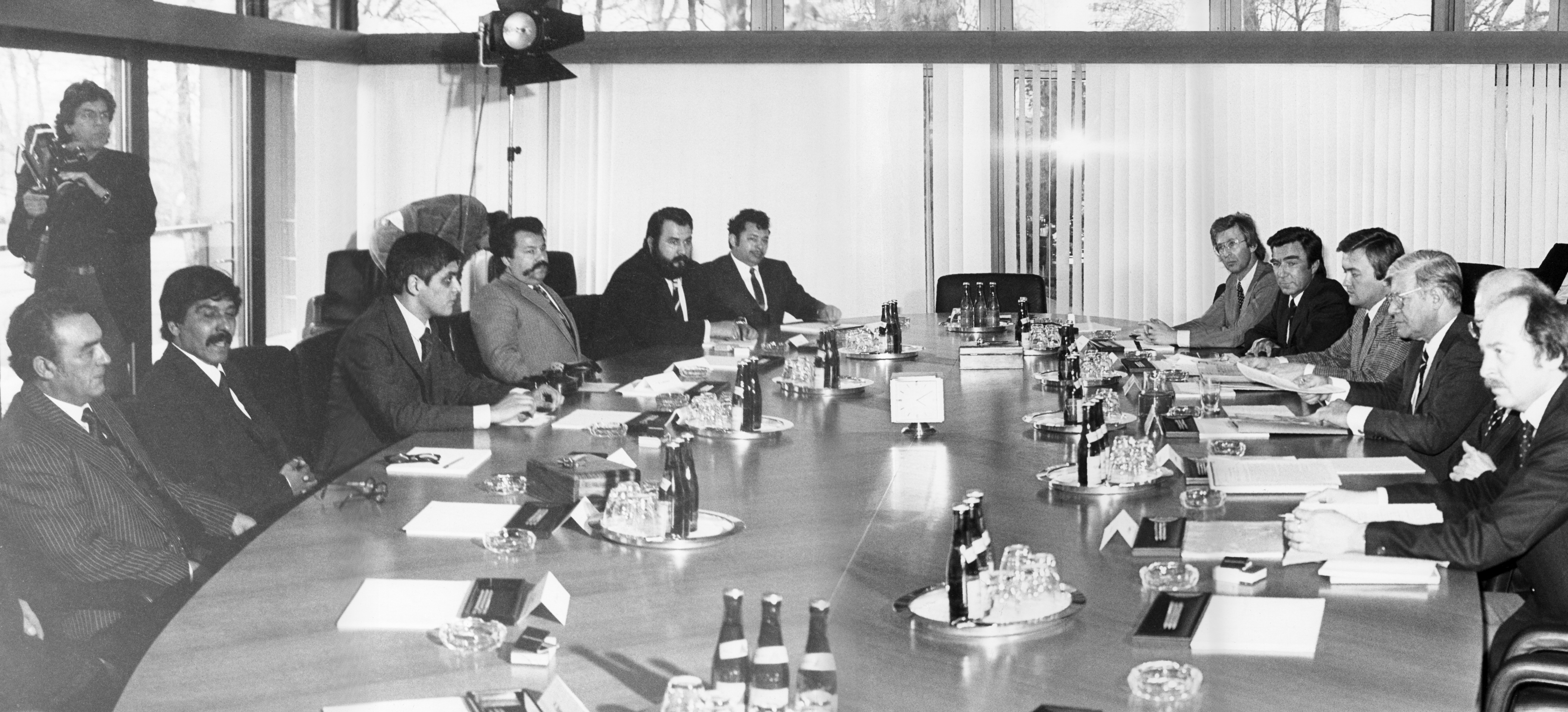 Entscheidende Zäsur – 1982 erkennt der damalige Bundeskanzler Helmut Schmidt die nationalsozialistischen Verbrechen an den Sinti und Roma erstmals als einen Völkermord aus Gründen der Rasse an